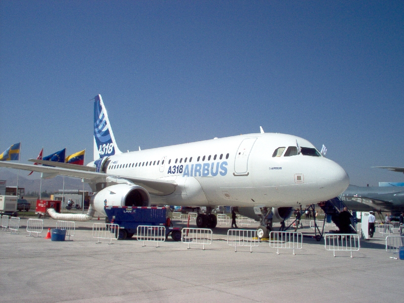 Airbus A318-121 (cn 1599) F-WWIA Durante su exhibición en FIDAE 2006, Santiago, Chile Foto tomada durante FIDAE 2006